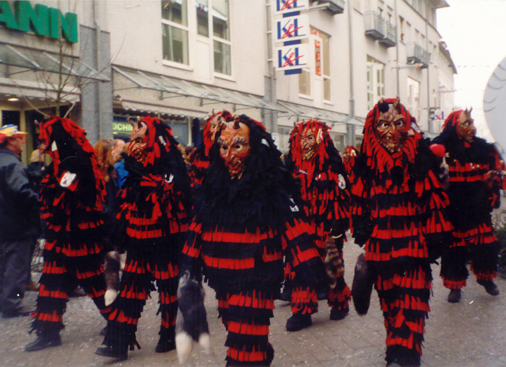 Narrenzunft Waldteufel Kau auf dem Umzug in Friedrichshafen 2001